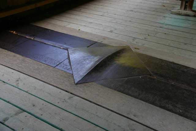 Europäische Wasserscheide am Altmühlüberleiter